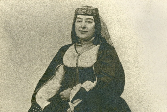 ბარბარე ერისთავი-ჯორჯაძე (1833-1895) - მეცხრამეტე საუკუნის ქართული კულტურის წარმომადგენელია. გარდა ლიტერატურული და საზოგადოებრივი, მათ შორის, ქალთა განათლებისა და უფლებების სფეროში მოღვაწეობისა, საინტერესოა მისი დამოკიდებულება ქართულ ენასთან, როგორც კულტურულ მოვლენასთან, მისი მნიშვნელობის გააზრება და საკამათო და საინტერესო მოსაზრებები ენასა და მეტყველებასთან დაკავშირებით.